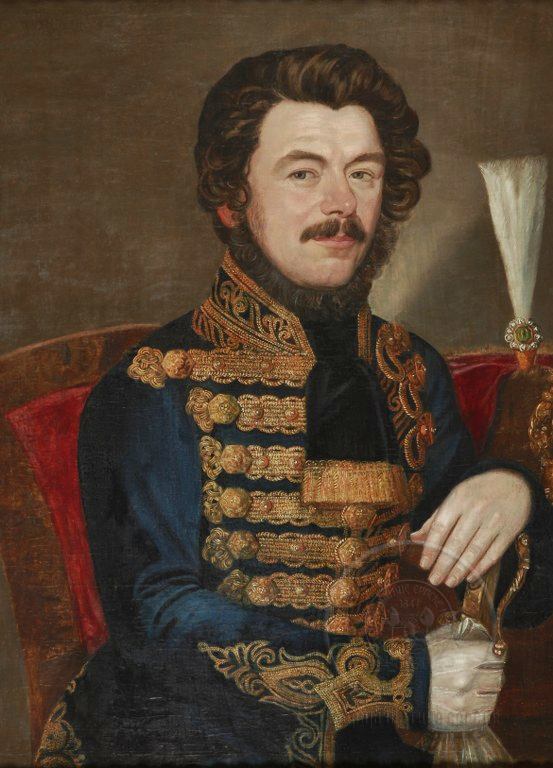 Фотографија слике Никола Алексић Јован Стефановић Виловски (око 1850), из колекције Матице српске у Новом Саду, пренето са сајта: Овде